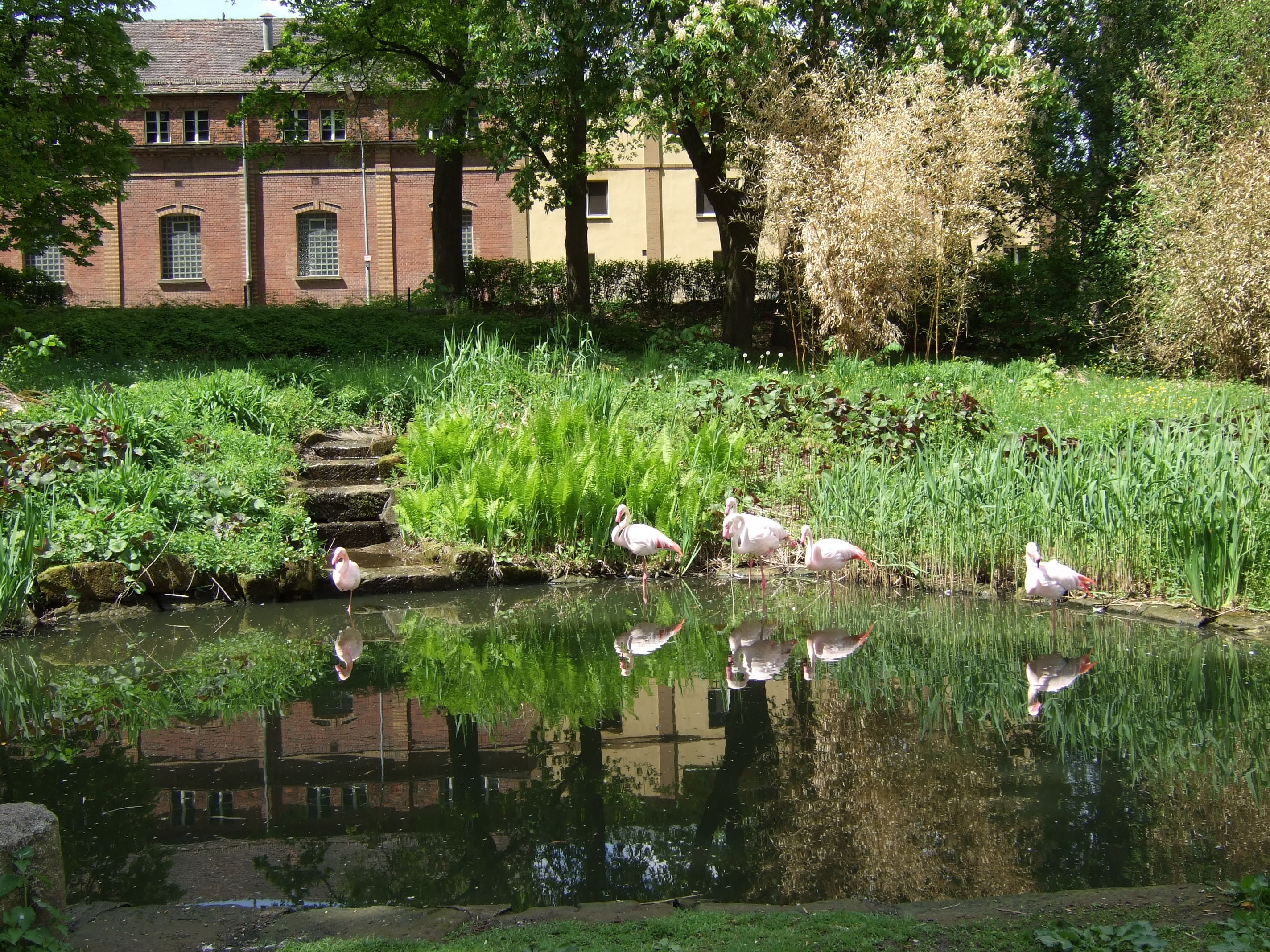 Tierpark Röhrensee Flamingos